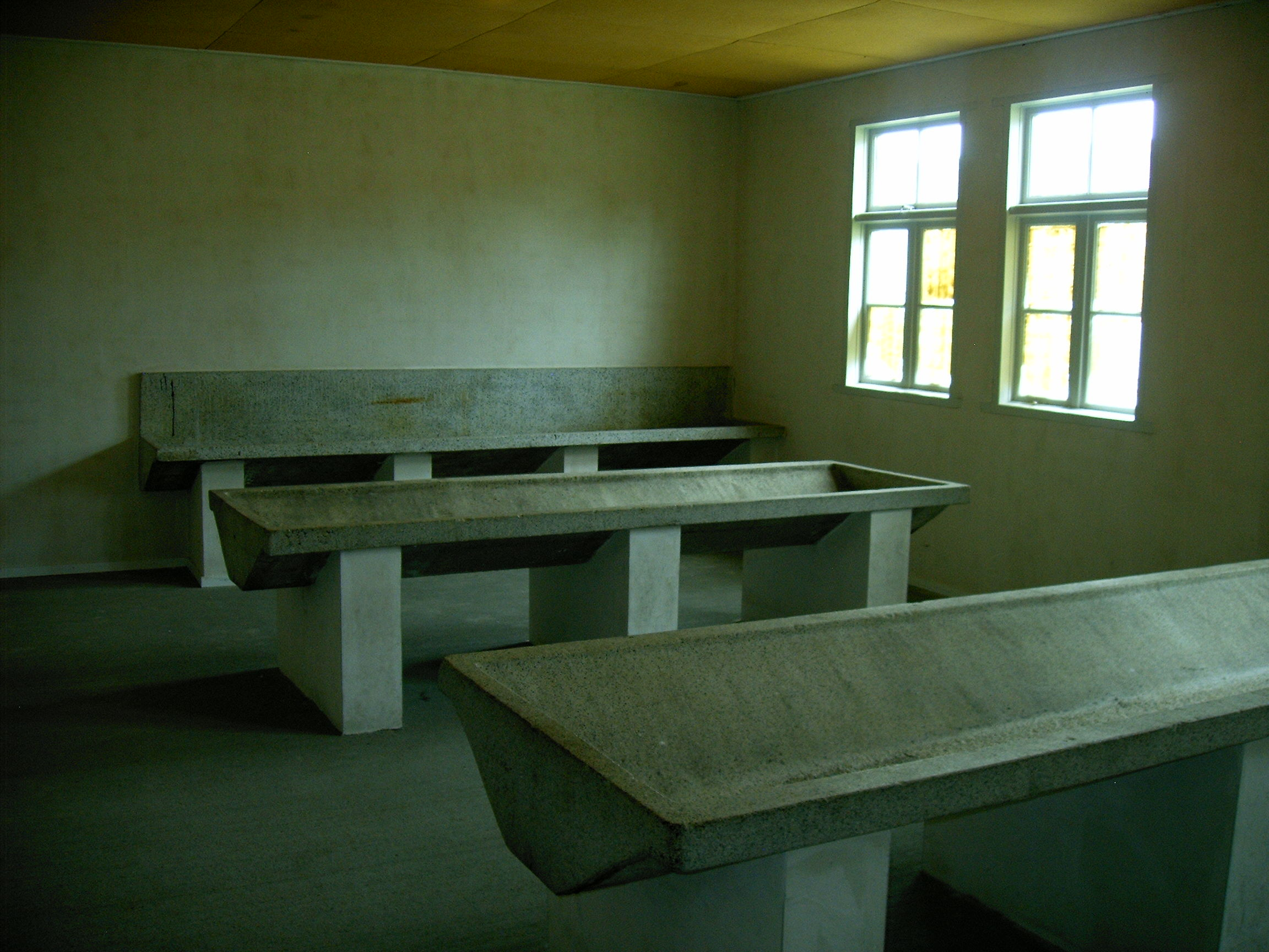 Nationaal monument kamp Vught, Was Ruimte